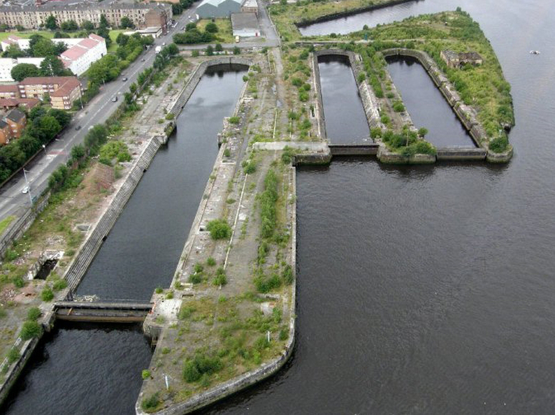 016 Govan Docks